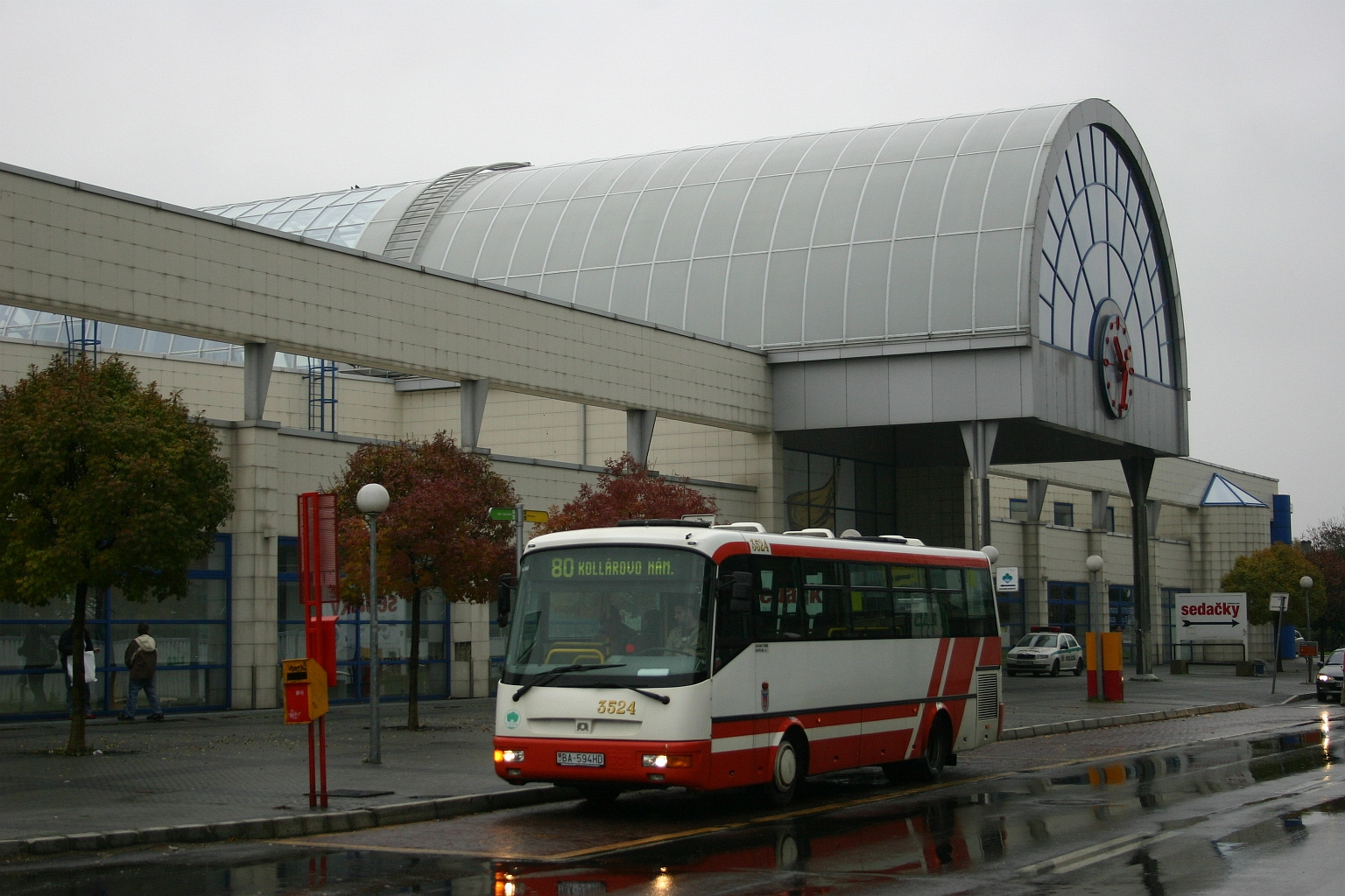 SOR B 9.5, Bratislava